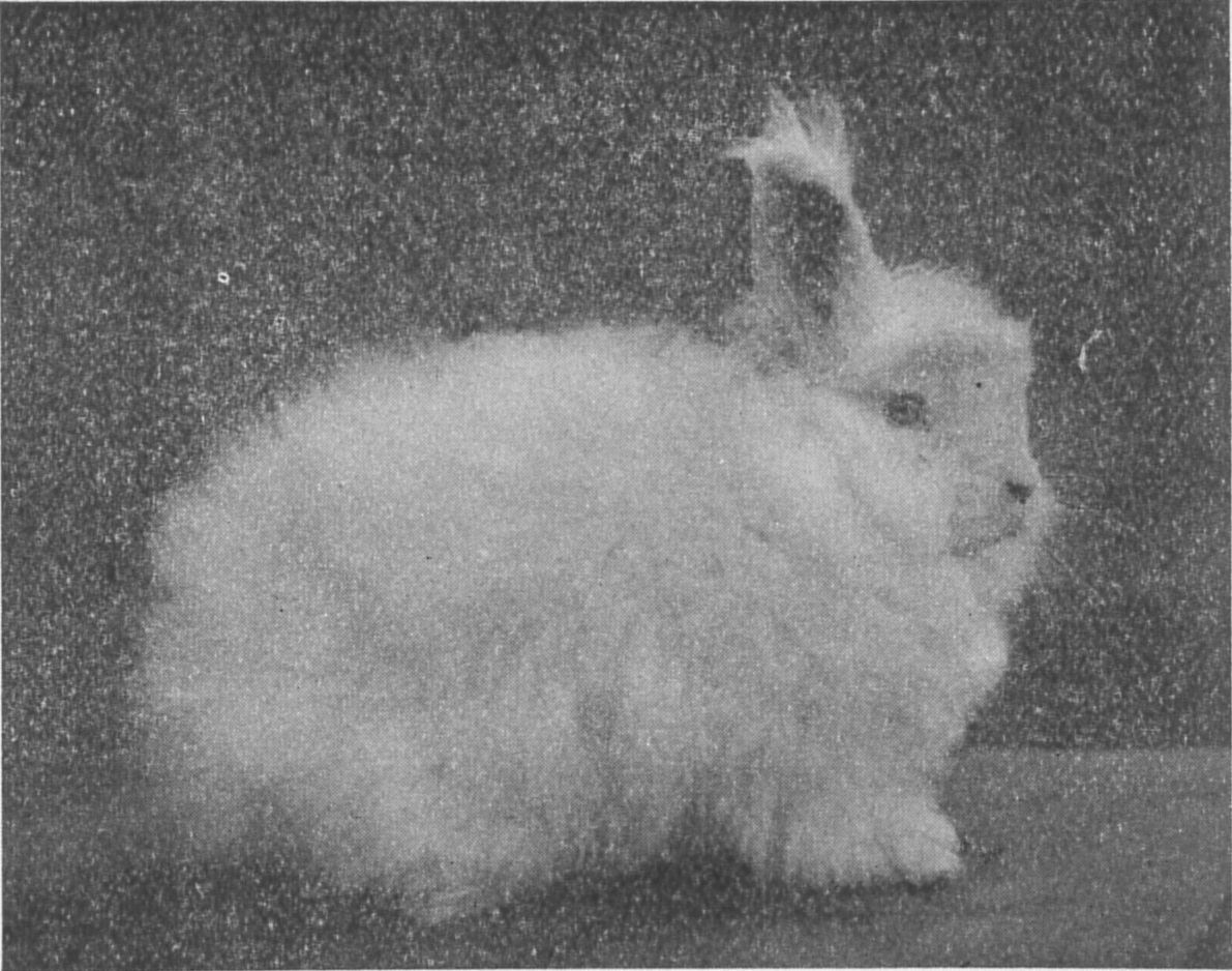 イギリス系アンゴラ若兎